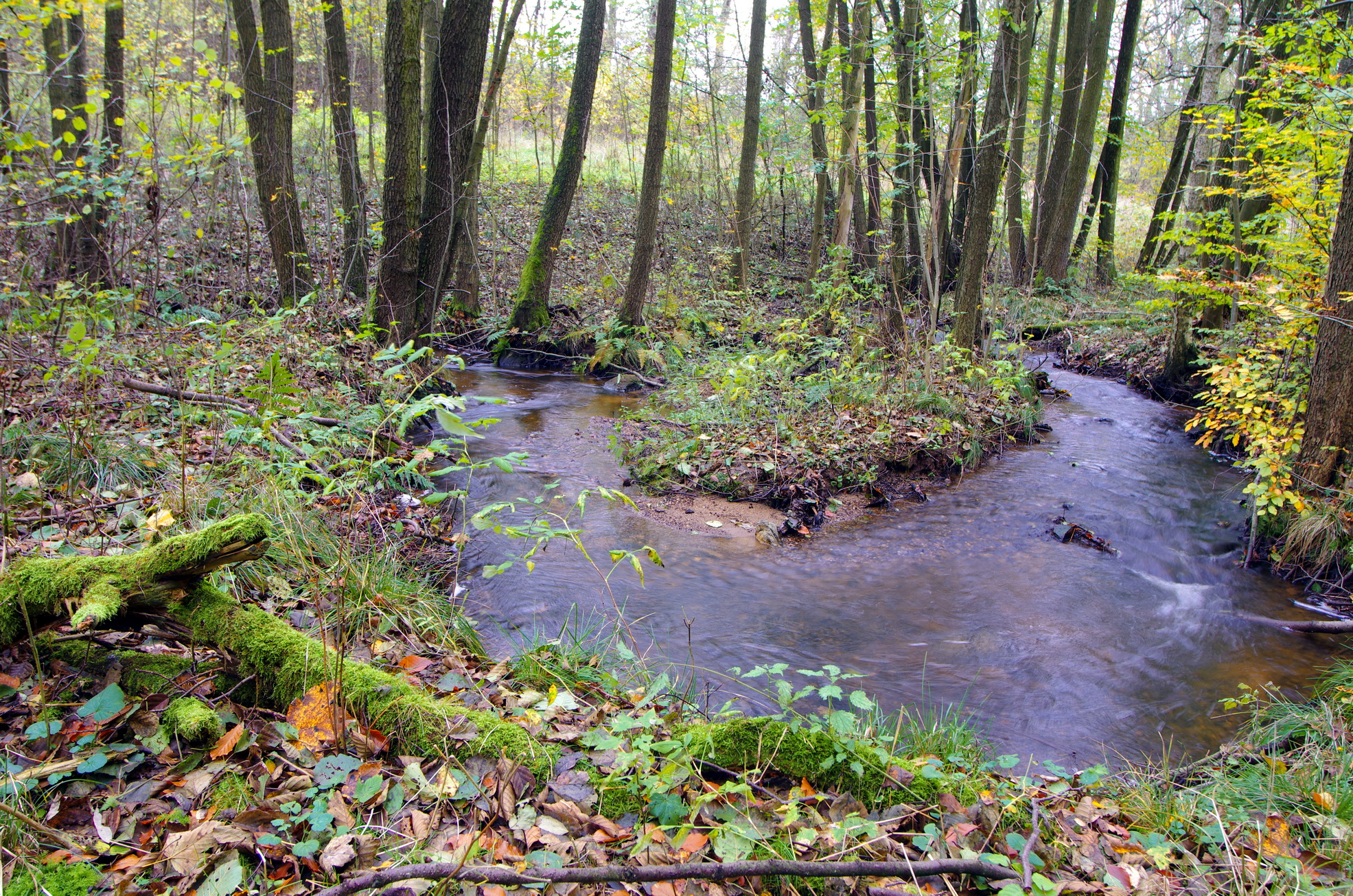 Přírodní památka - U cihelny, Hazlovský potok, Hazlov u Aše, okres Cheb